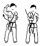 Karate Harai Uke (Goju Ryu)